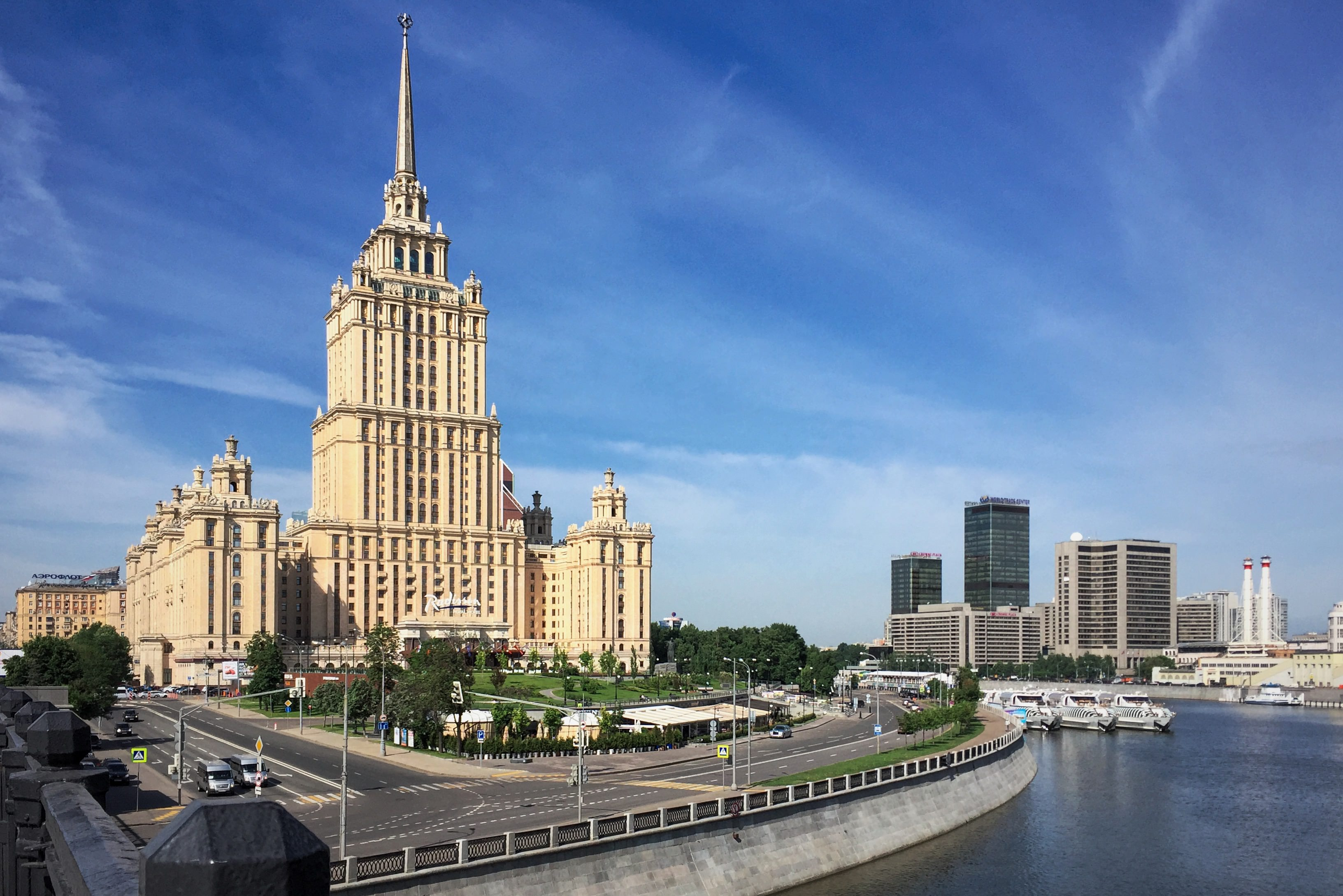 Набережная Тараса Шевченко - гостиница «Украина»